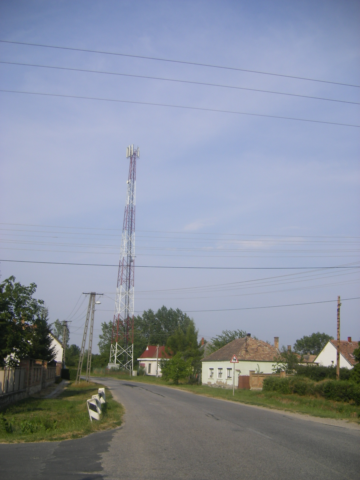 Pápateszér